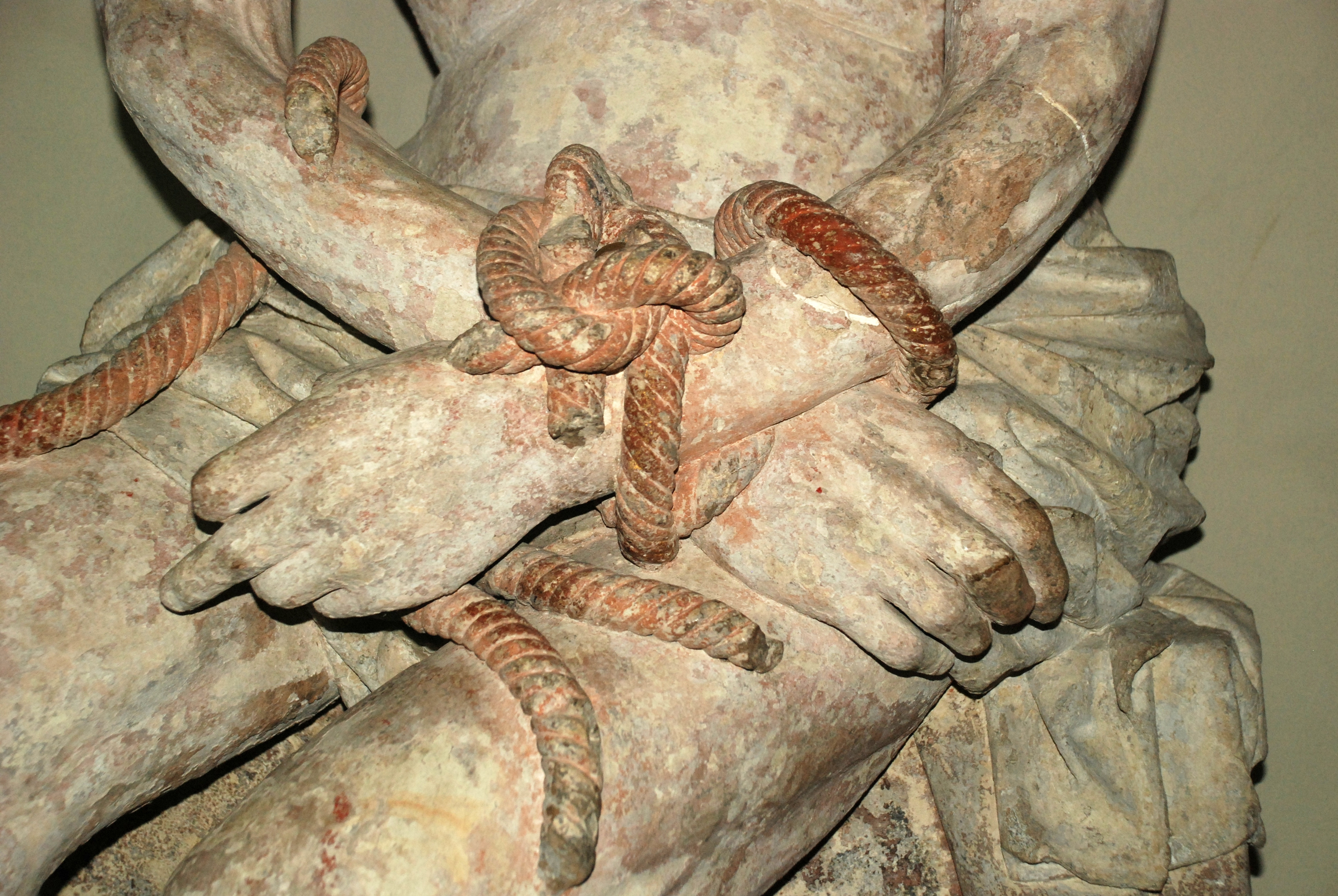 Belgique - Christ de pitié de Mousty